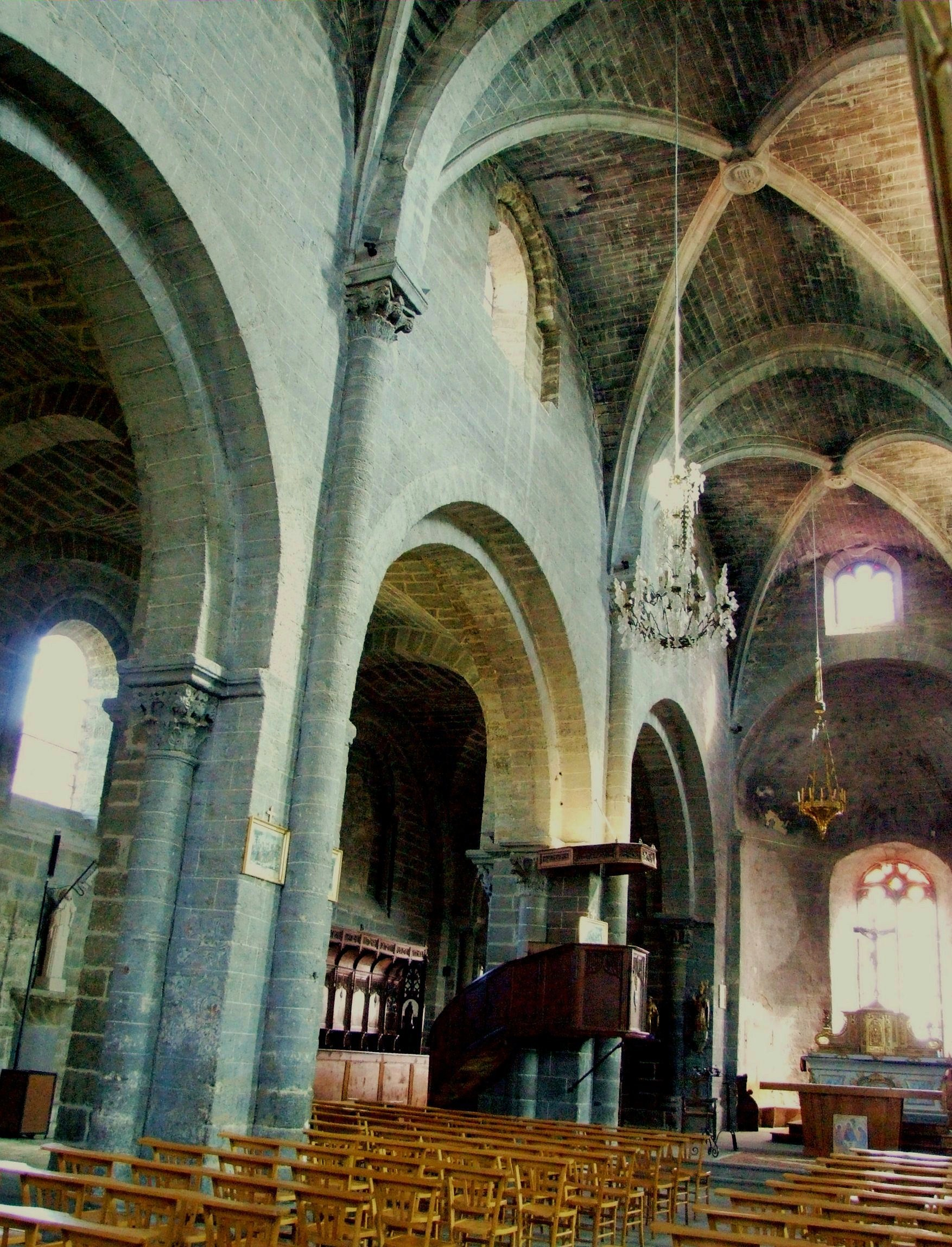 Chanteuges - Prieuré - Elévation de la nef